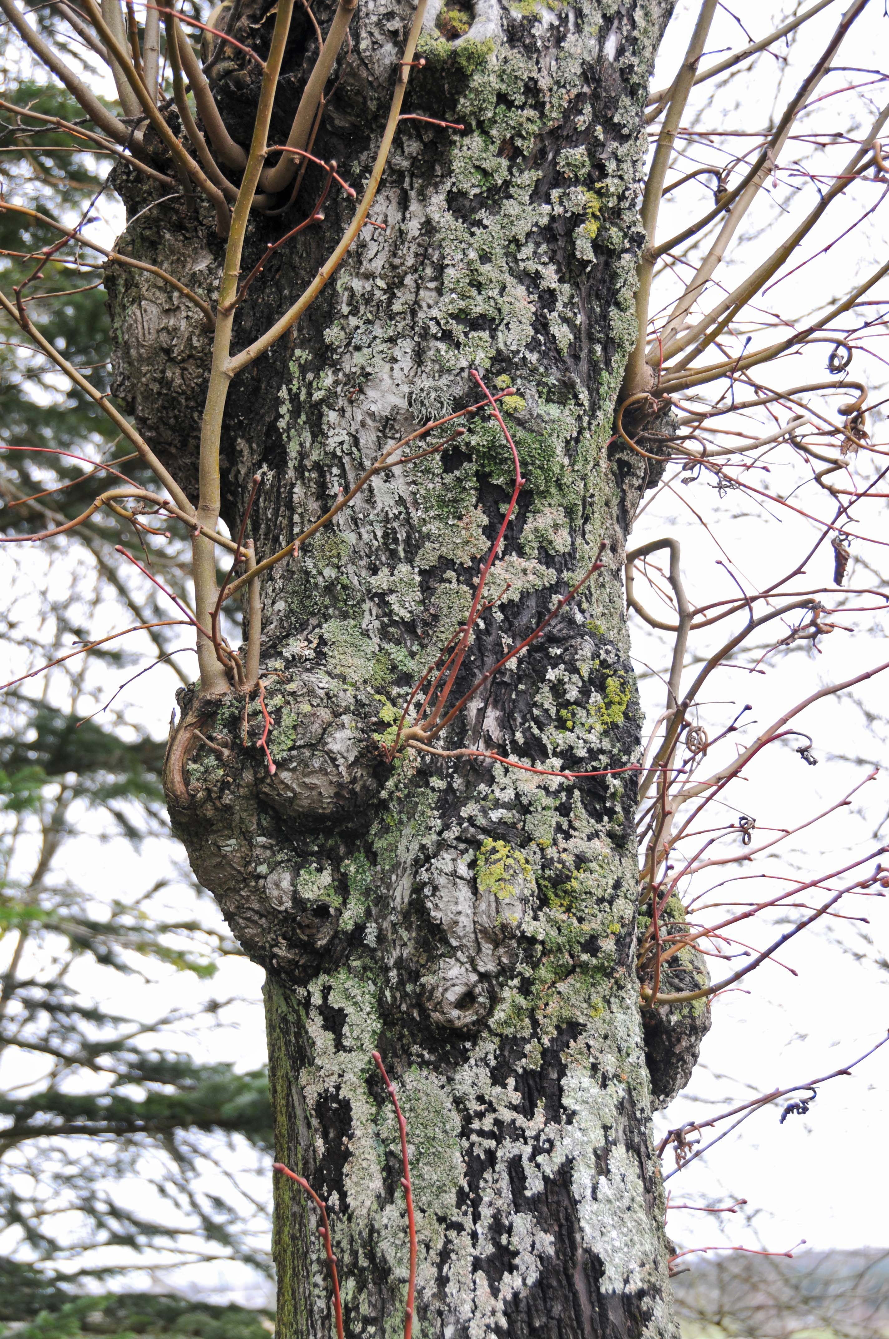 Flechten op enger Lann vun der Allee um Gréiwelshaff.